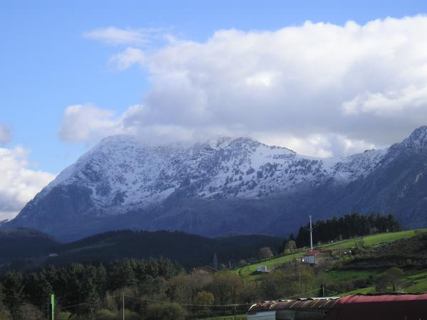 Anboto mendia.